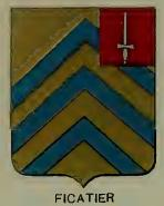 D'or, au trois chevrons d'azur ; au quartier des barons militaires brochant sur le tout. Livrées : bleu, rouge, jaune.